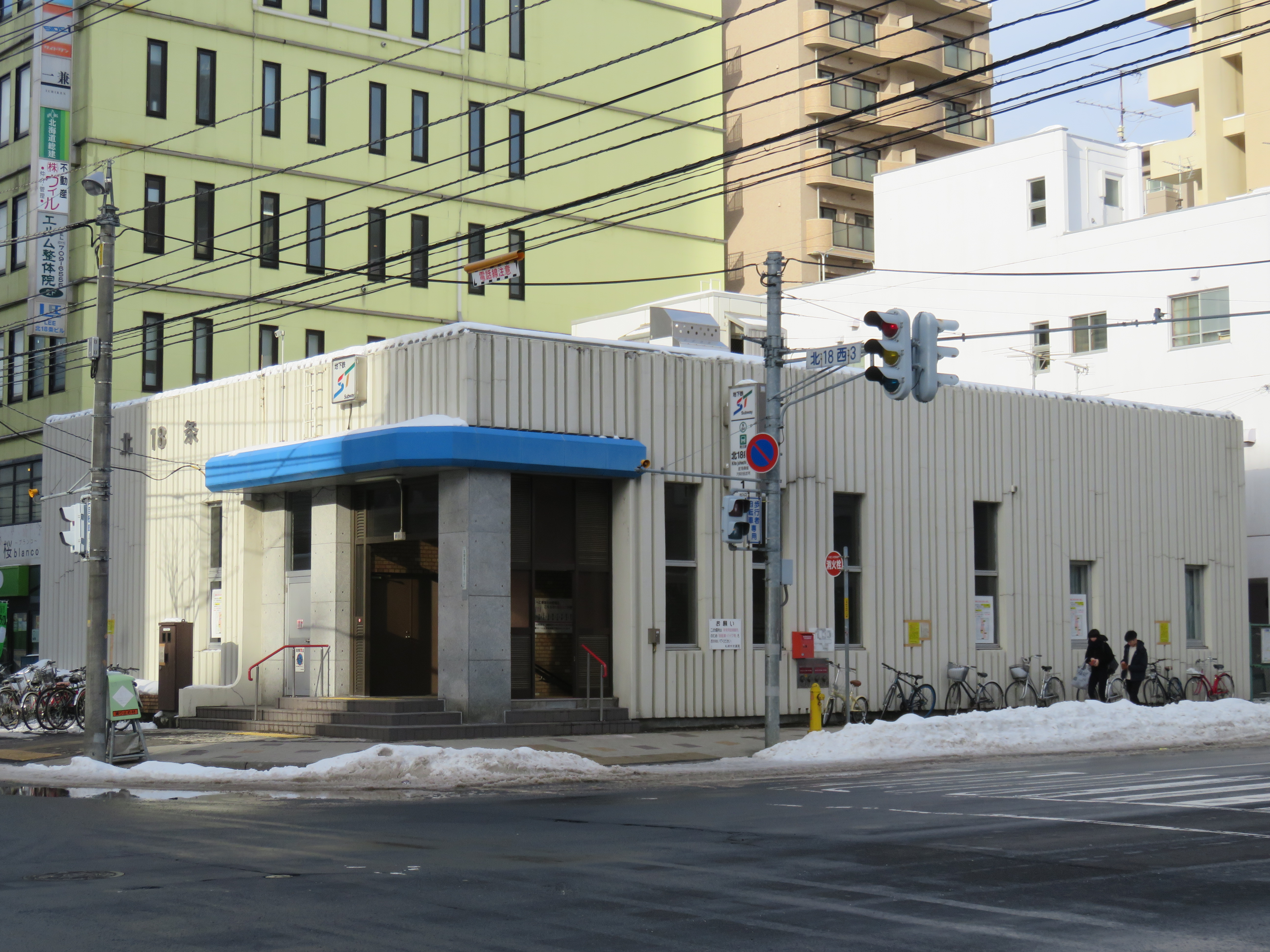 北18条駅1番出入口